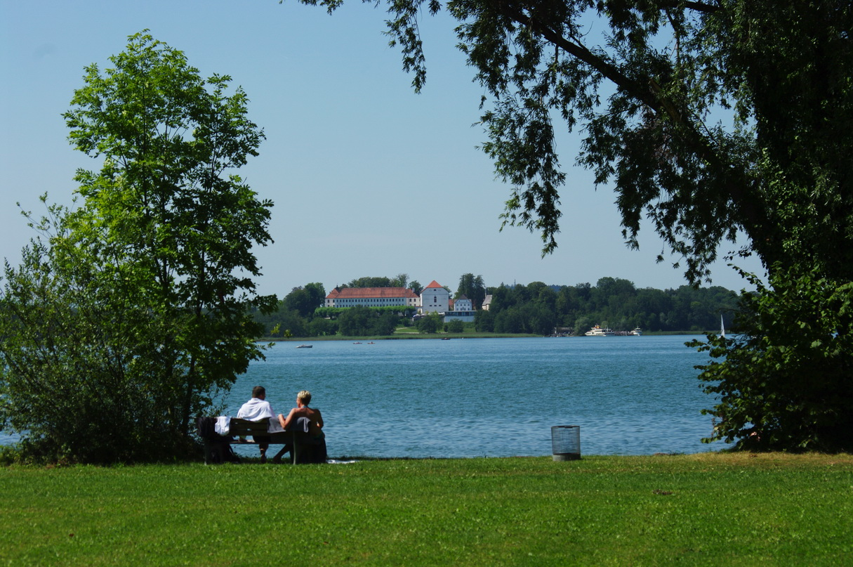 Blick von der Fraueninsel zur Herreninsel